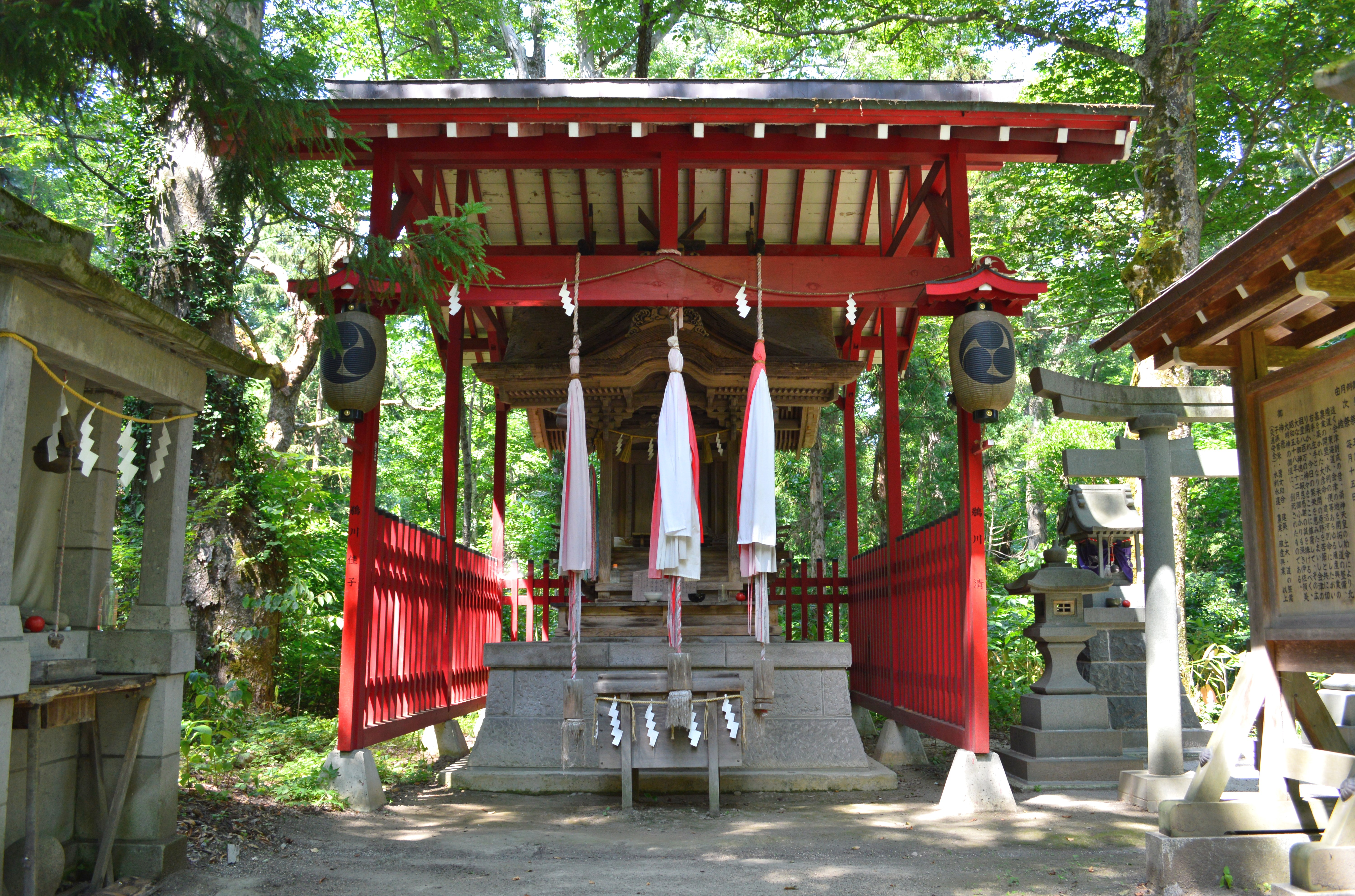 伊佐須美神社 境内会津大國魂神社